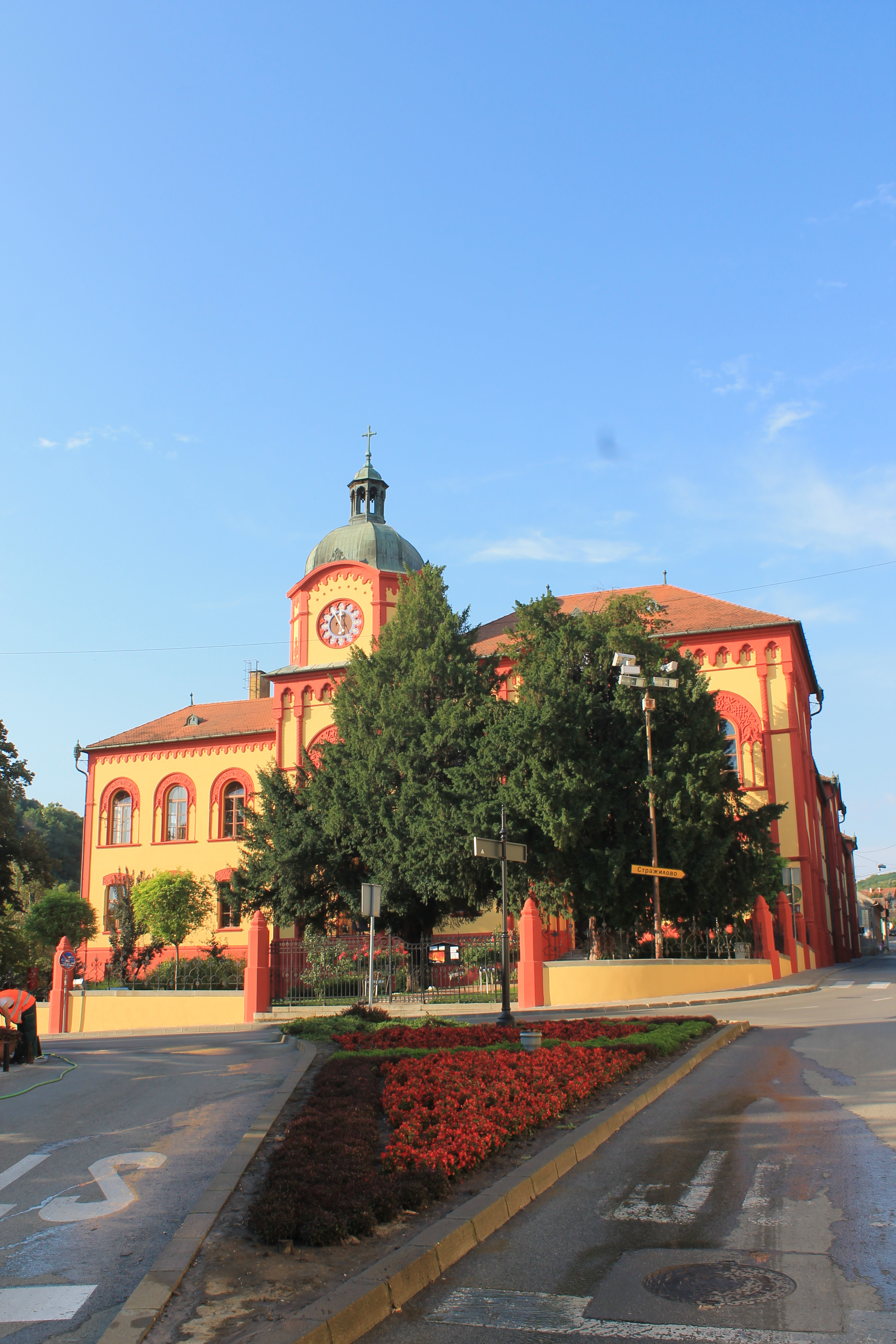 Karlovačka gimnazija